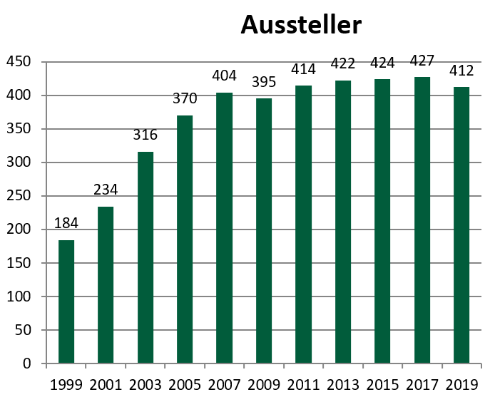 Aussteller Statistik